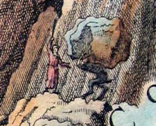 Die Teufelsbrücke. Detail des Randbilds von Johann Melchior Füssli auf dem handkolorierten Kupferdruck von J. J. Scheuchzers Nova Helvetiae Tabula Geographica von 1712 (linke obere Ecke).